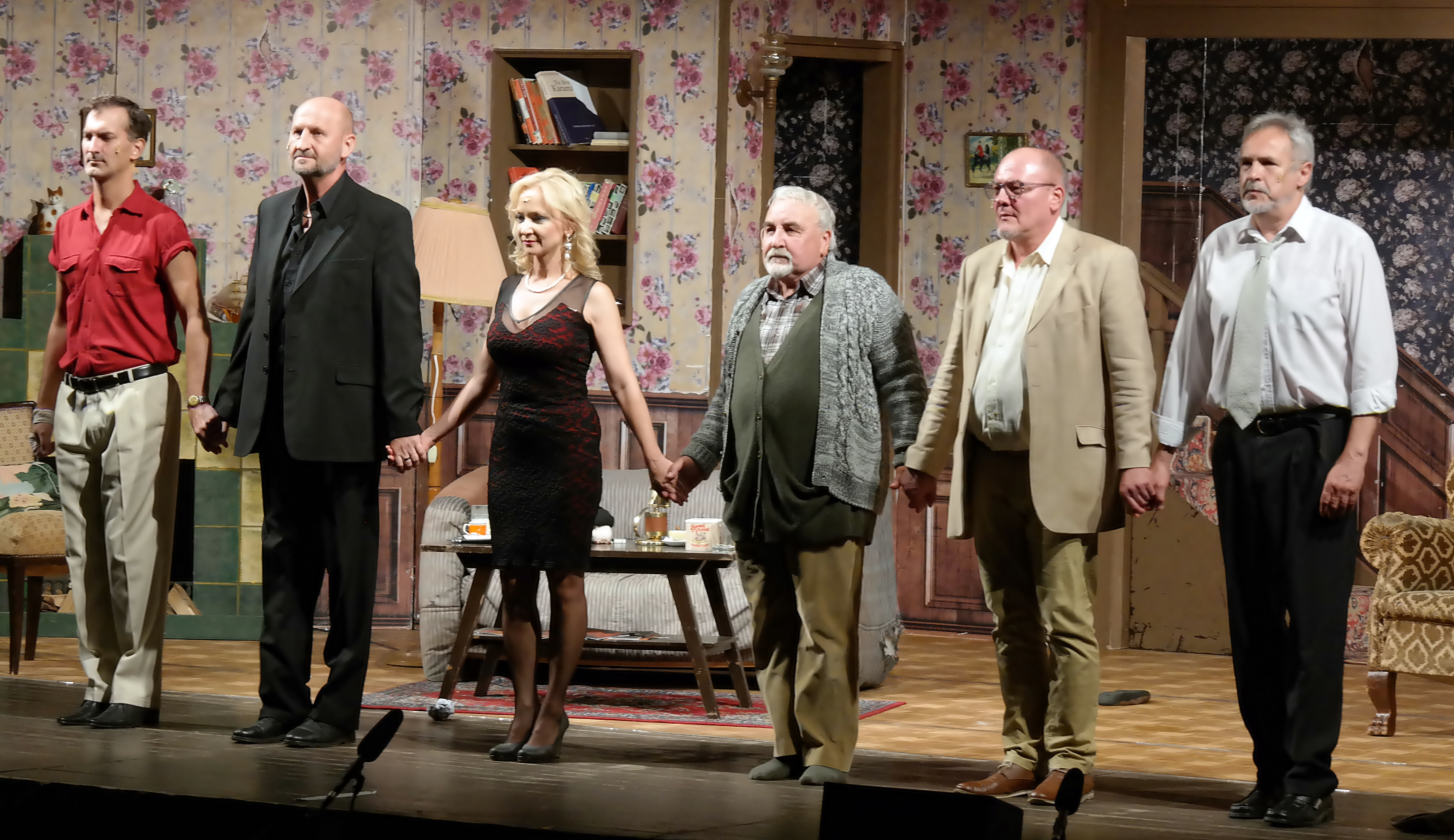 A "Hazatérés" című dráma tapsrendje. A Zenthe Ferenc Színház előadása